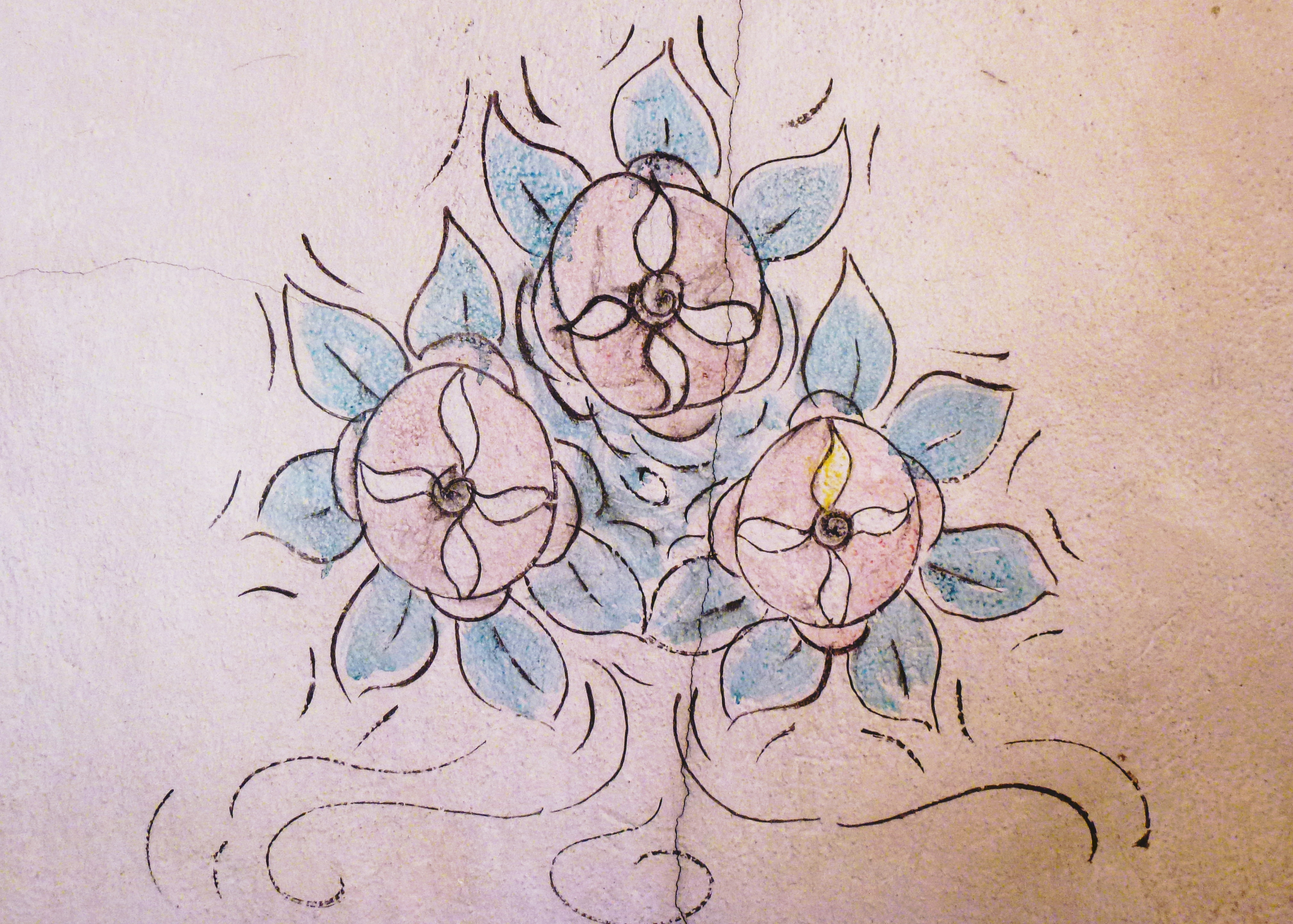 Villa Tomtebo, Sjötorpsvägen 14, arkitekt Gustaf Hugo Sandberg, dekor på spiskåpan